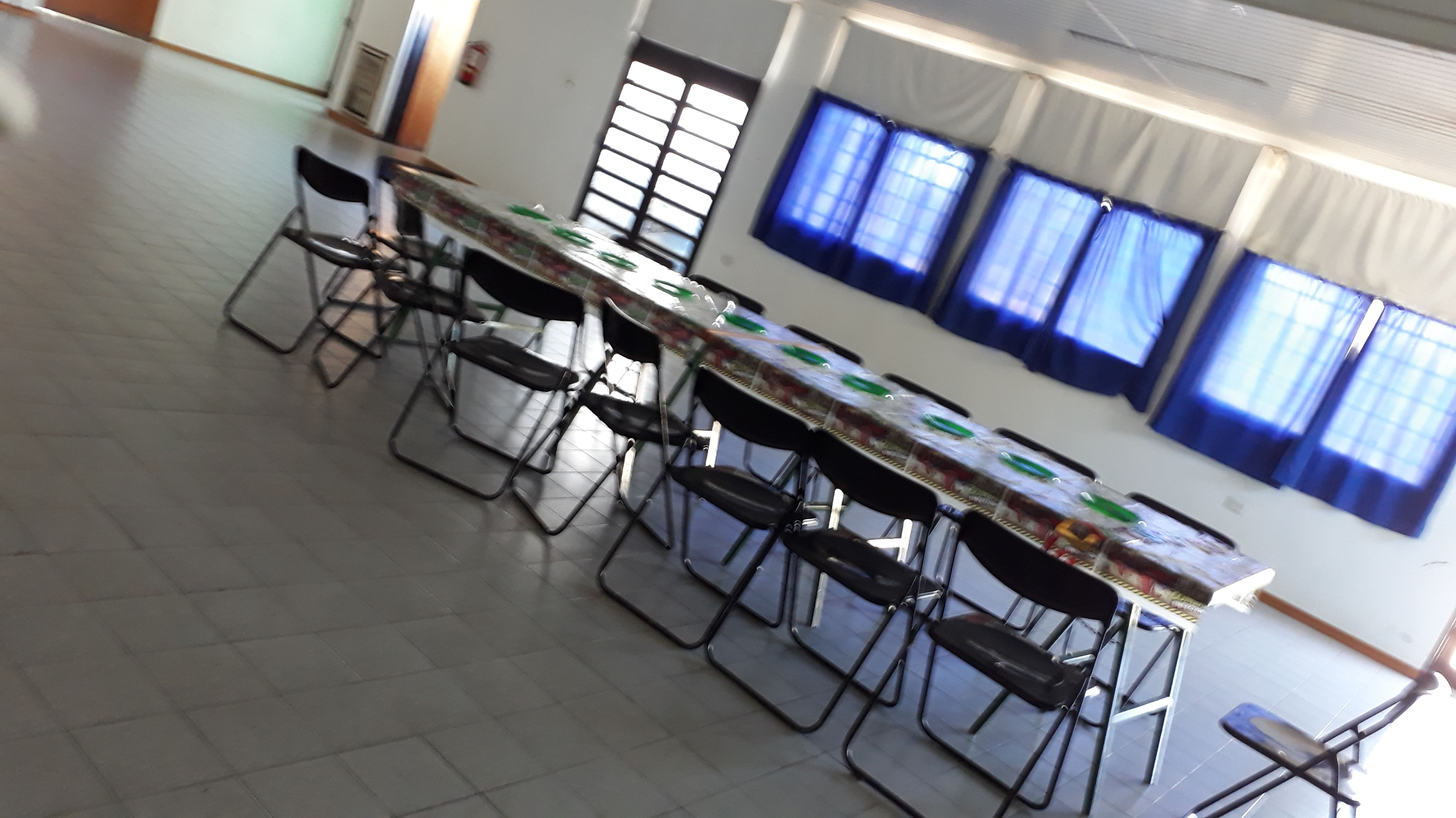 preparación del cuarto oscuro, previo al inicio de acto eleccionario